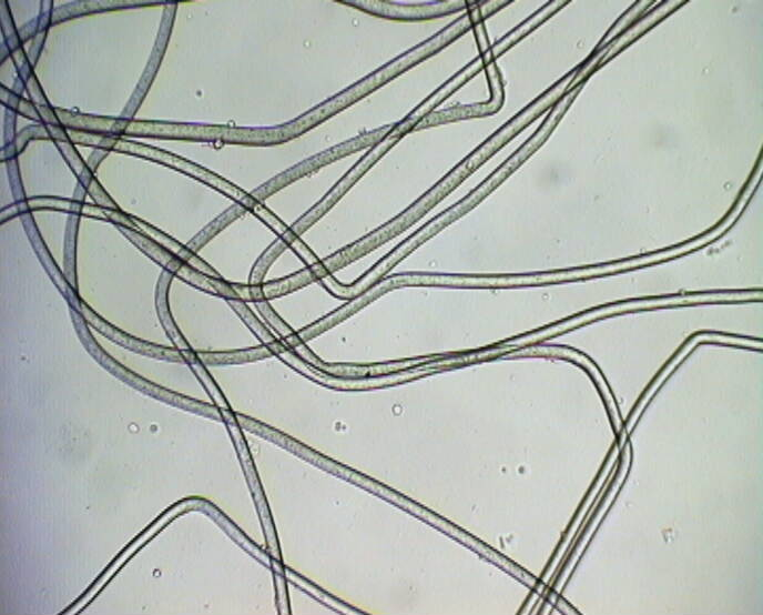 Poliammide vista al microscopio. Foto realizzata dagli studenti dell' ITIS Marzotto di Valdagno (VI), ITALIA